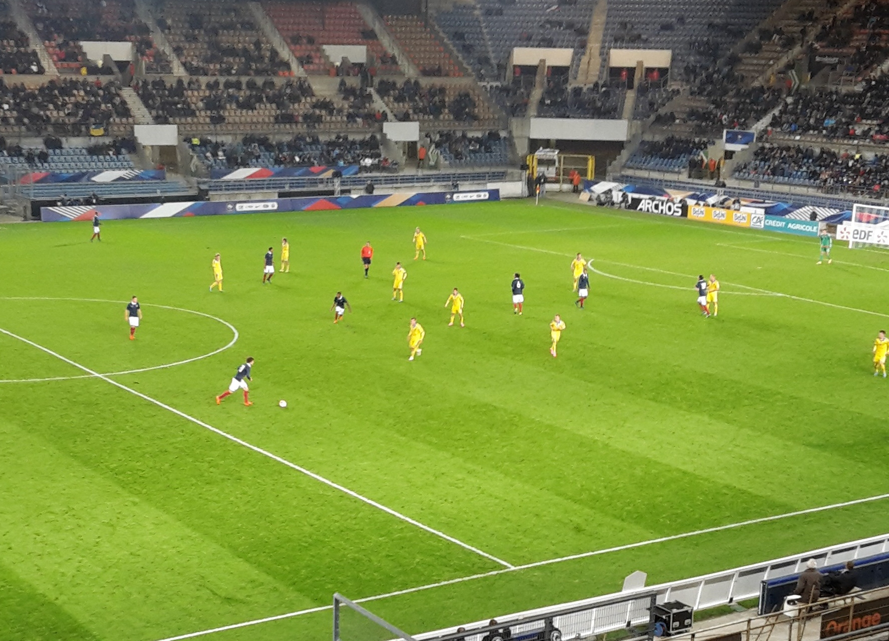 France Espoir - Ukraine Espoir 13/10/2015